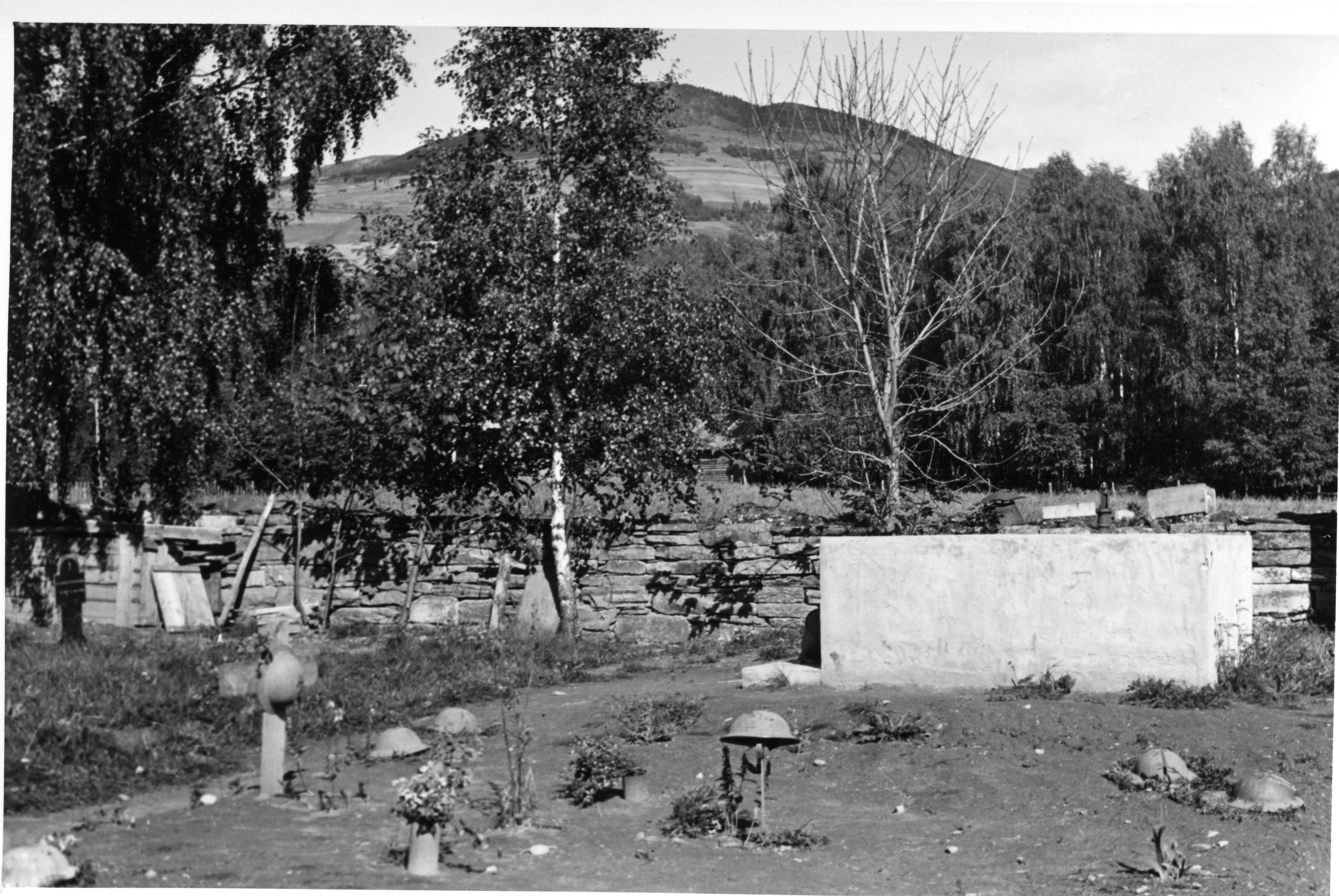 Bildet er hentet fra Arkivverket. Engelske soldatgraver i Kvam i Gudbrandsdalen Arkivinstitusjon : Riksarkivet Arkivnavn : Løken, Hallvard Sted : Norge, Oppland, Nord-Fron, Kvam Emneord: 2. verdenskrig, Andre verdenskrig Avbildet